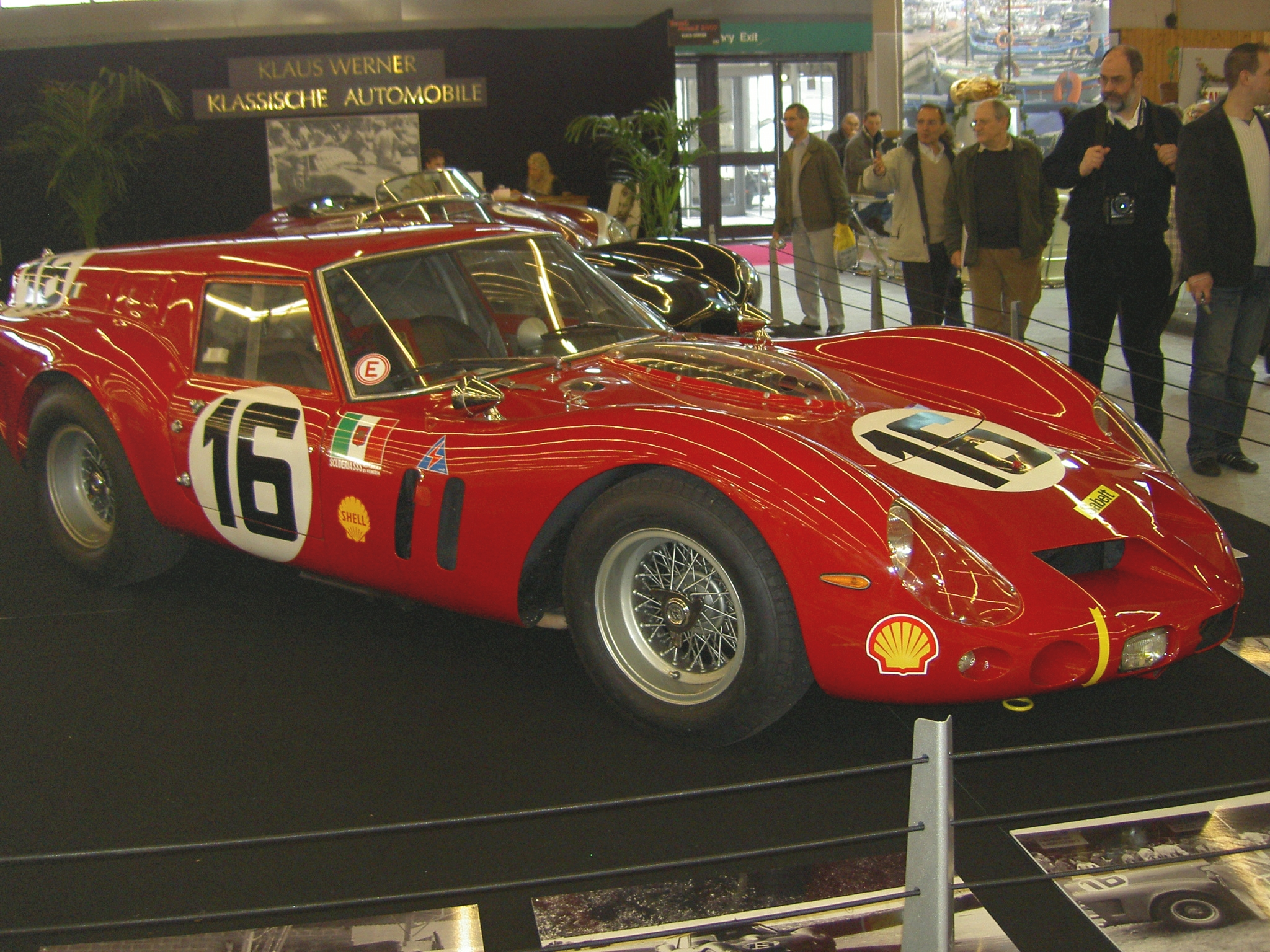 Ferrari 250 GT 'Breadvan' (24 heures du Mans 1962, Scuderia SSS Republica di Venezia).